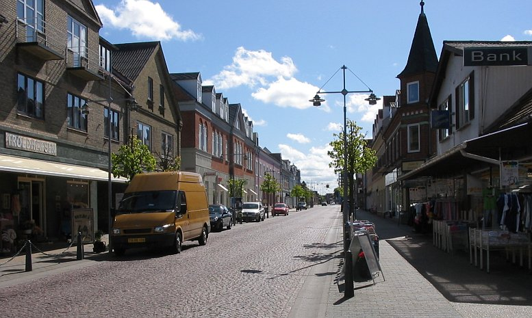 Brønderslev (Denmark)